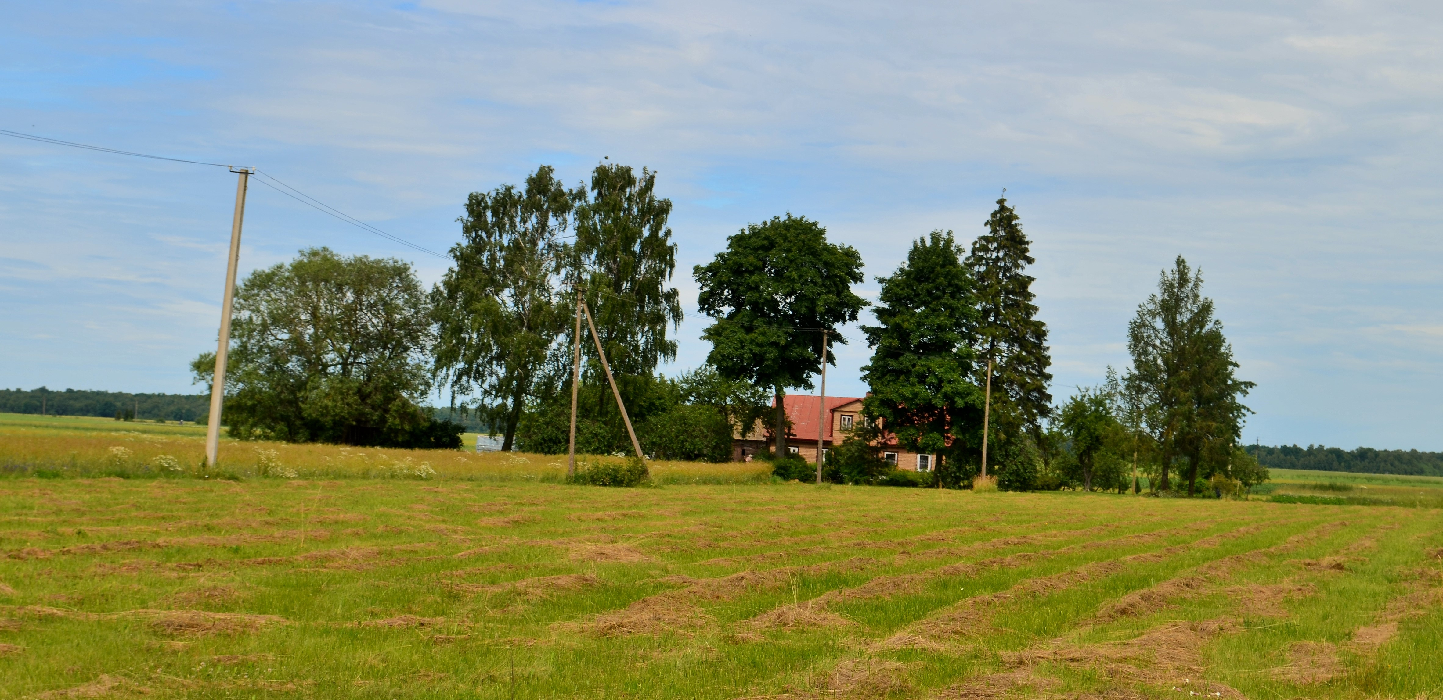 Bladikiai, Kėdainių raj.